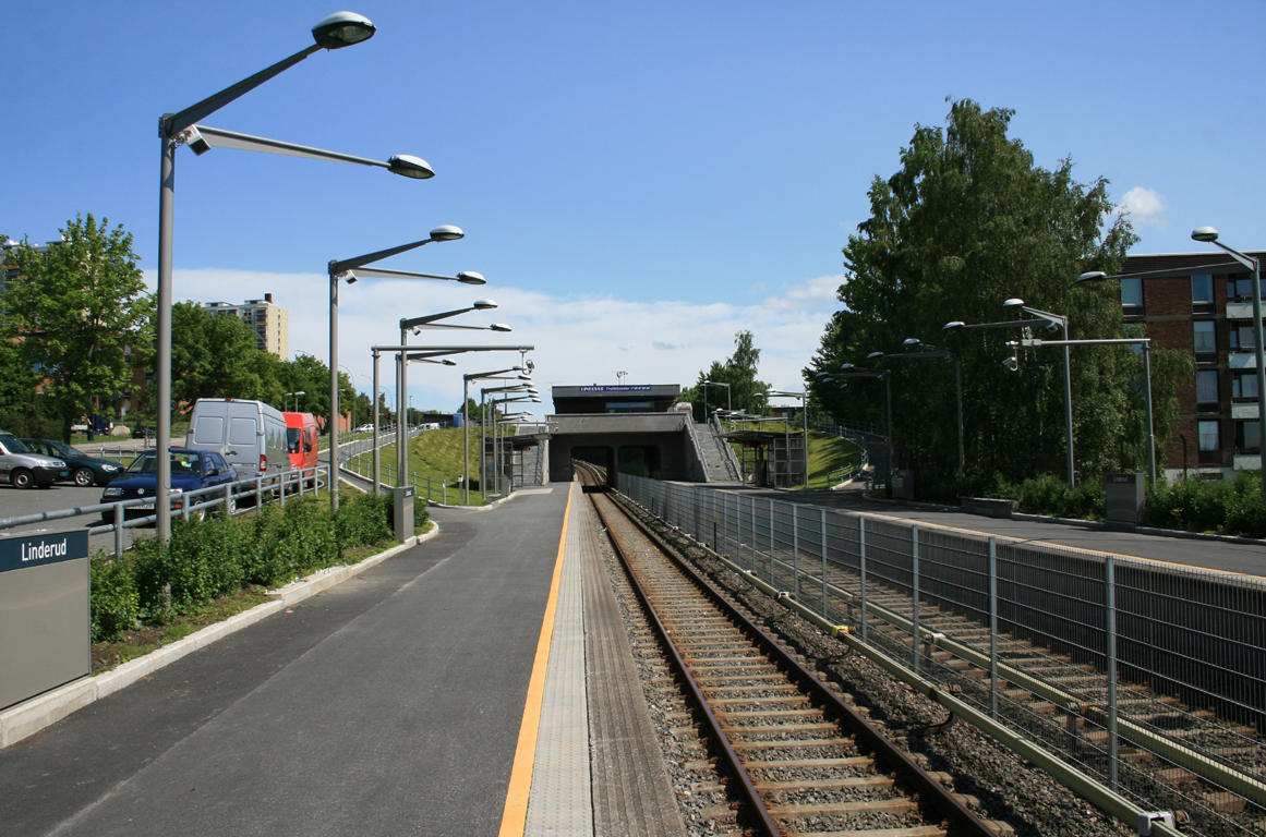 Linderud T-banestasjon sett fra plattformen mot Vollebekk. Billedretning er mot Veitvet stasjon.